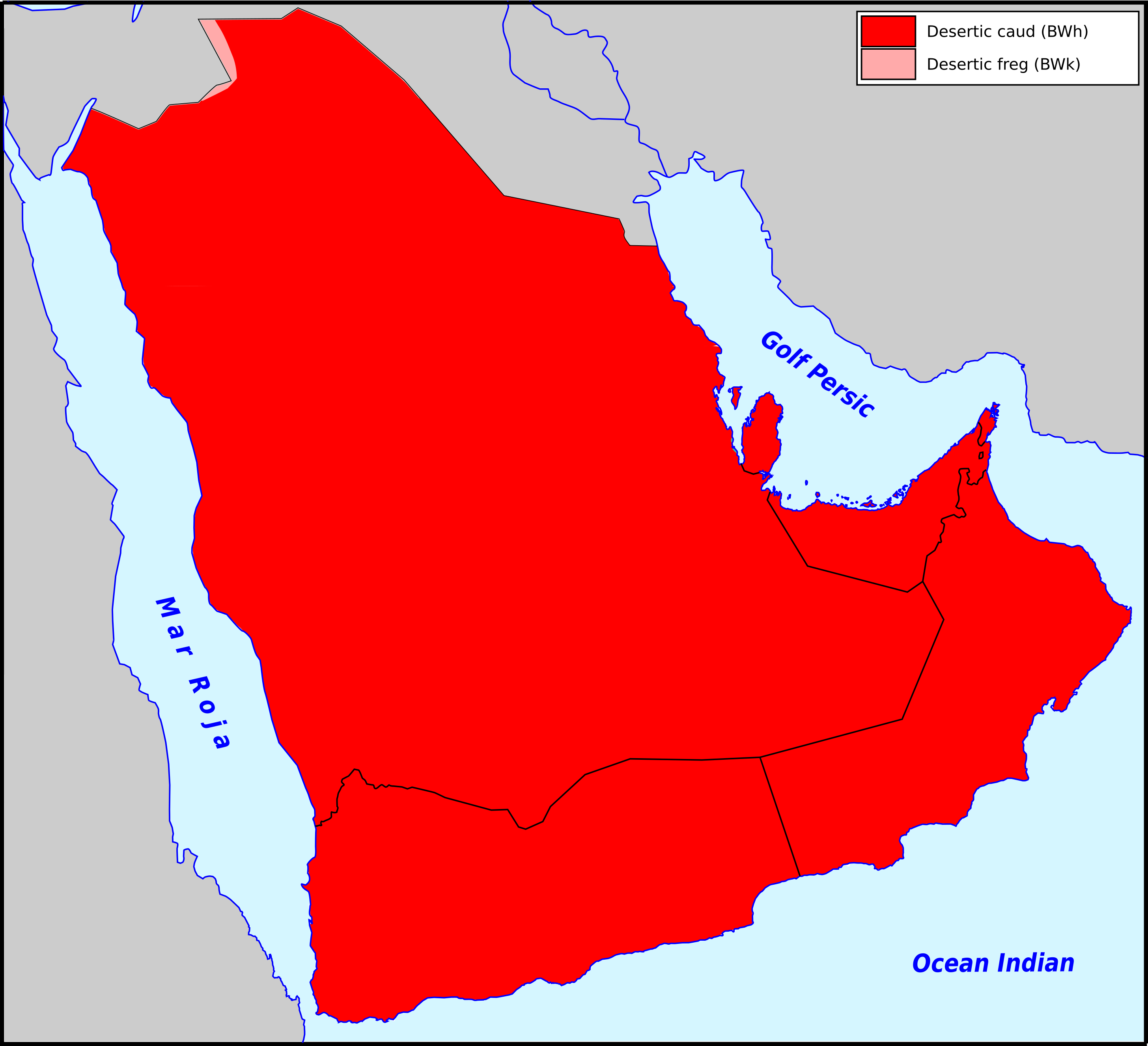 Clima segon la classificacion de Köppen dins la Peninsula Aràbia